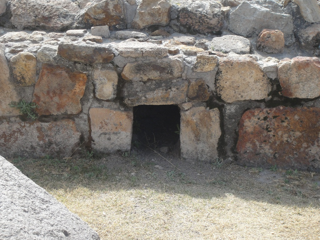 Template:Plazuelas, caracoles drainage